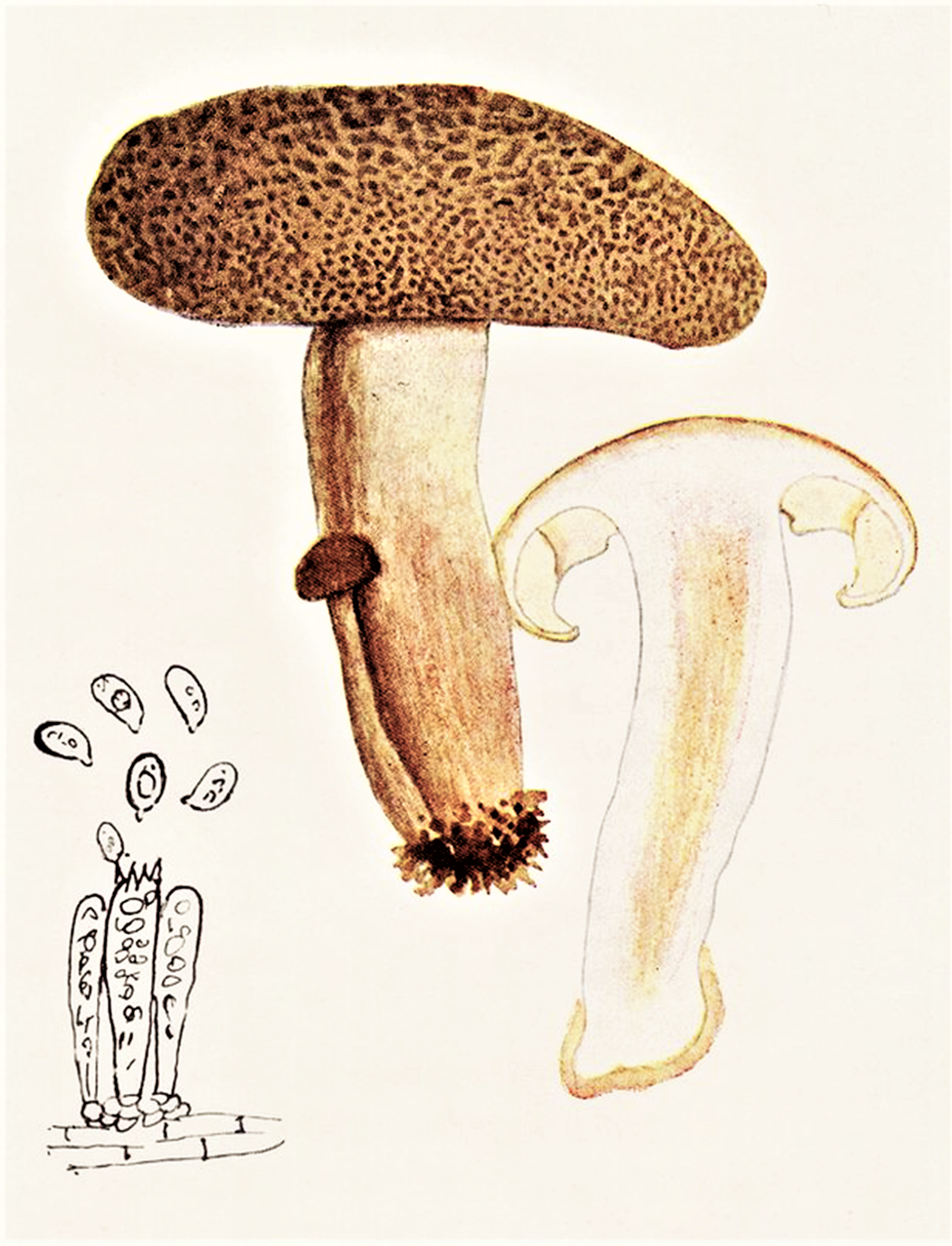 Giacomo Bresadola: Tricholoma imbricatum (Fr., 1815) P.Kumm. (1871)